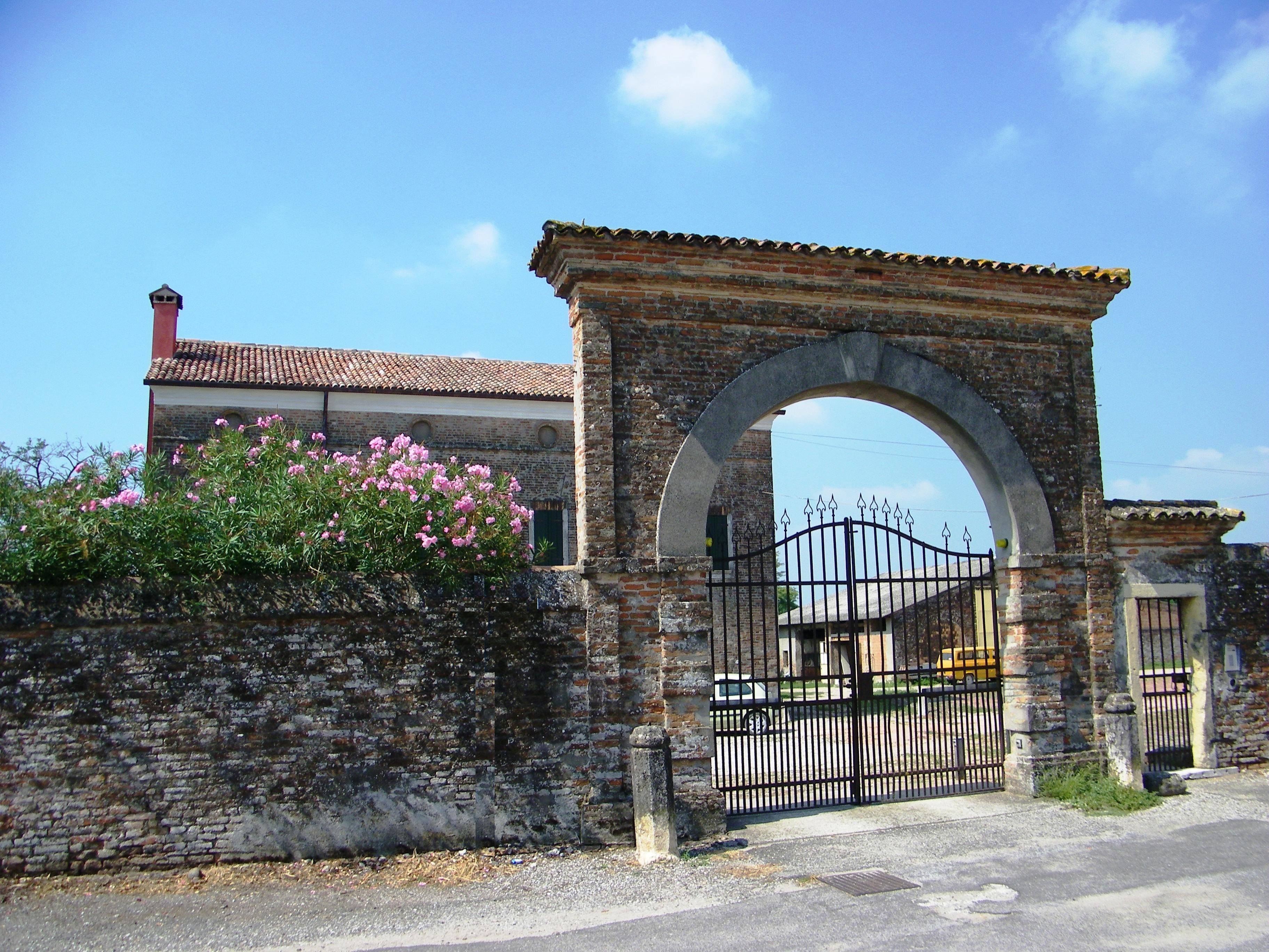 Villa Peagni - Bovolone